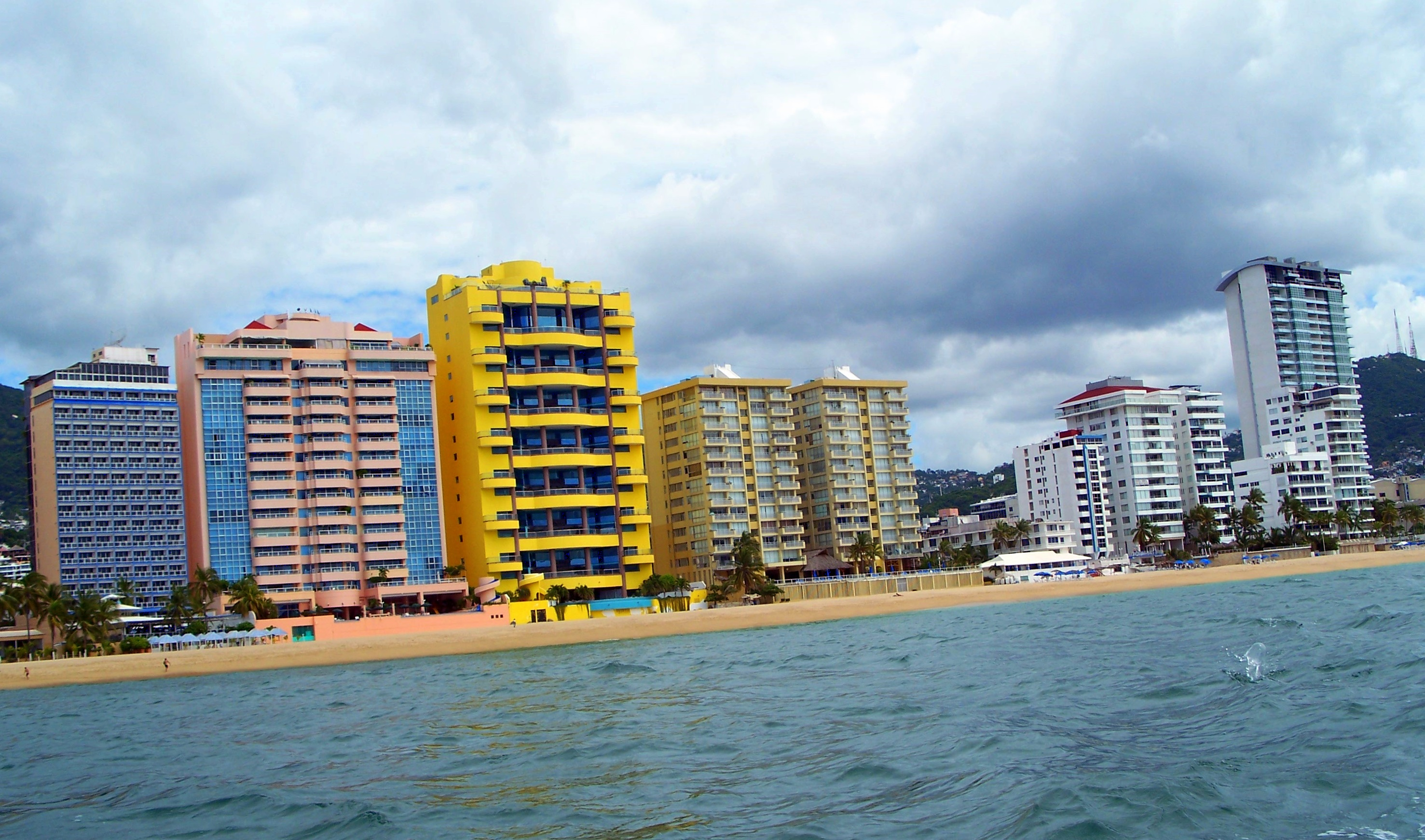 Playa y edificios de la zona de Magallanes en Acapulco, Guerrero, México.